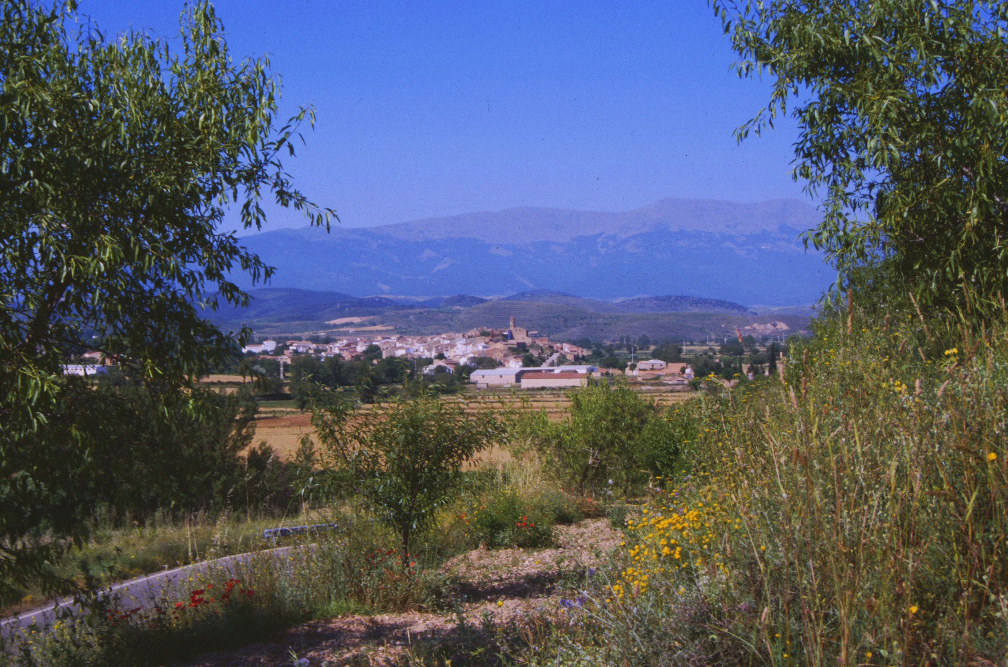 Moncayo (Nordspanien): Vera